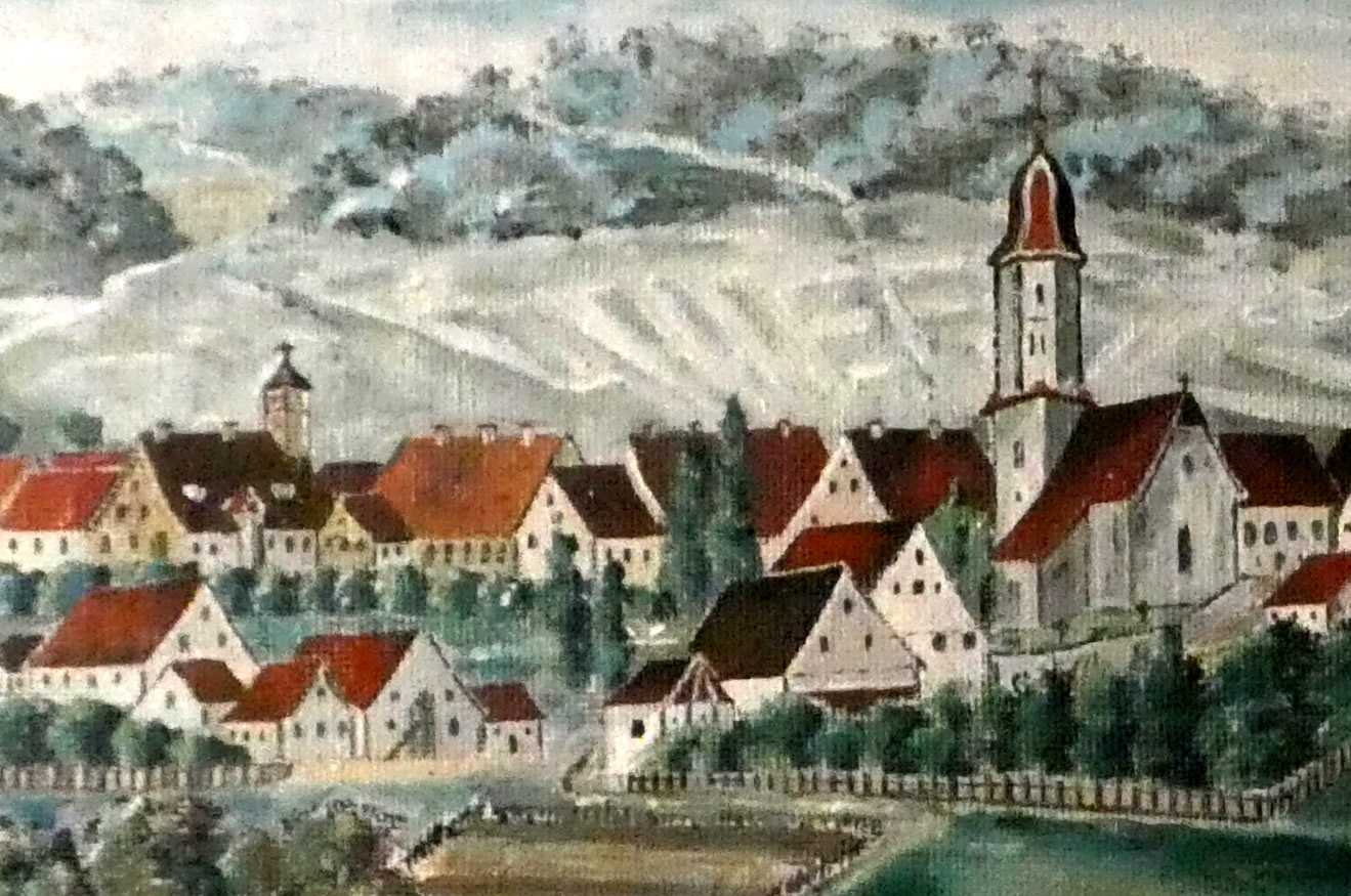 Oberkochen 1887 - Detail von File:Oberkochen 1847.jpg